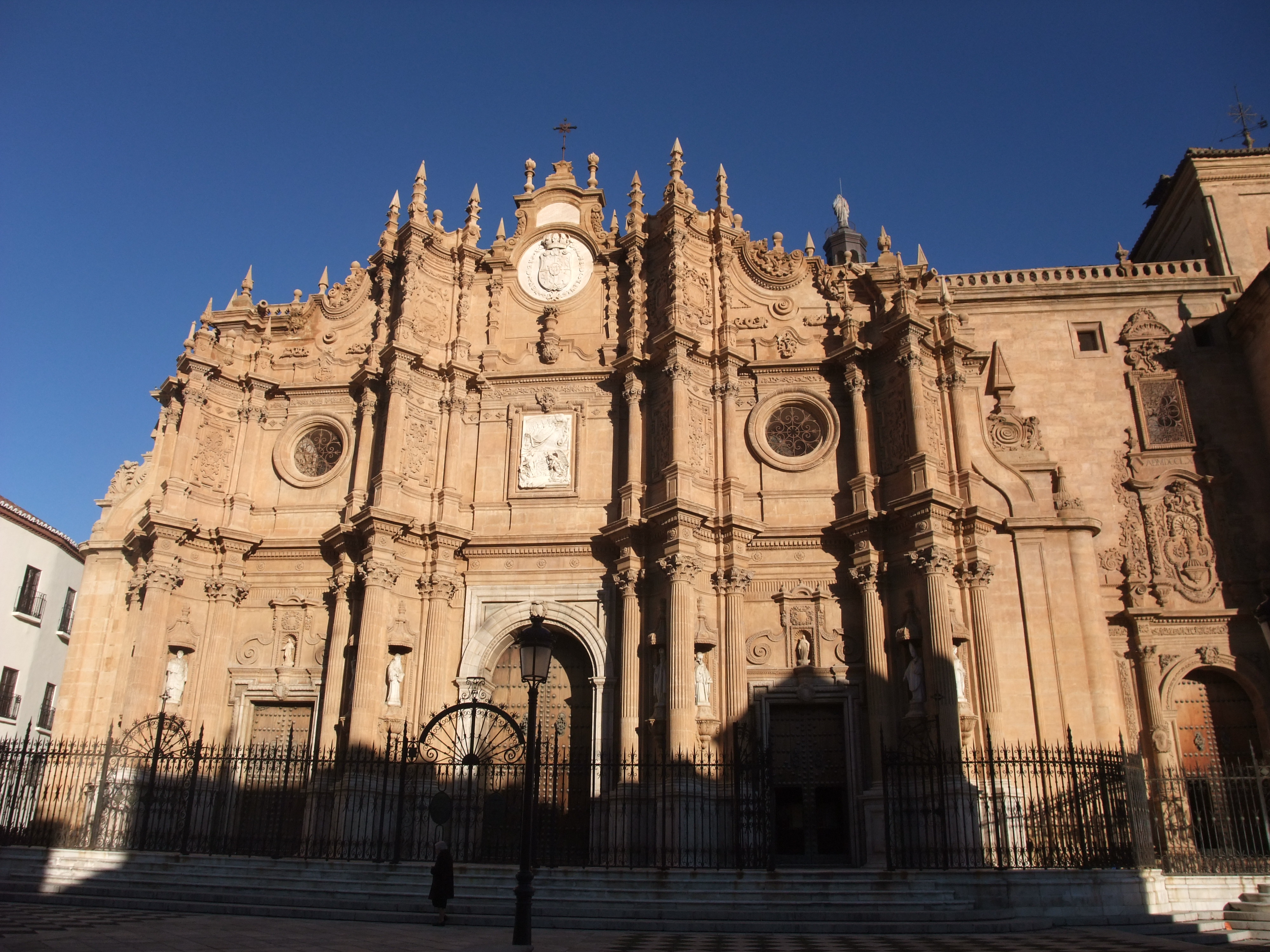 Guadix (Granada)-Catedral-2